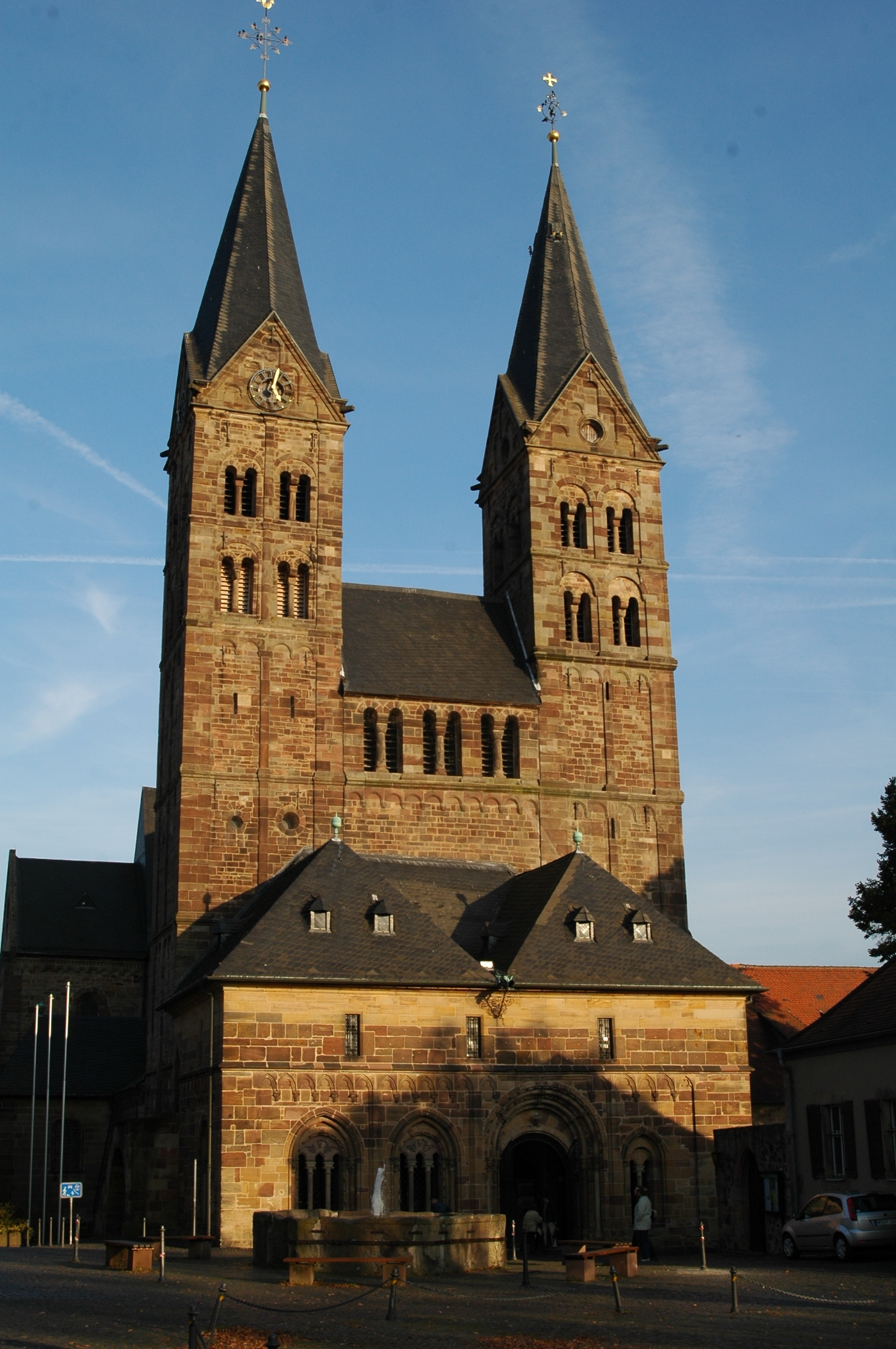 Fritzlar, Dom